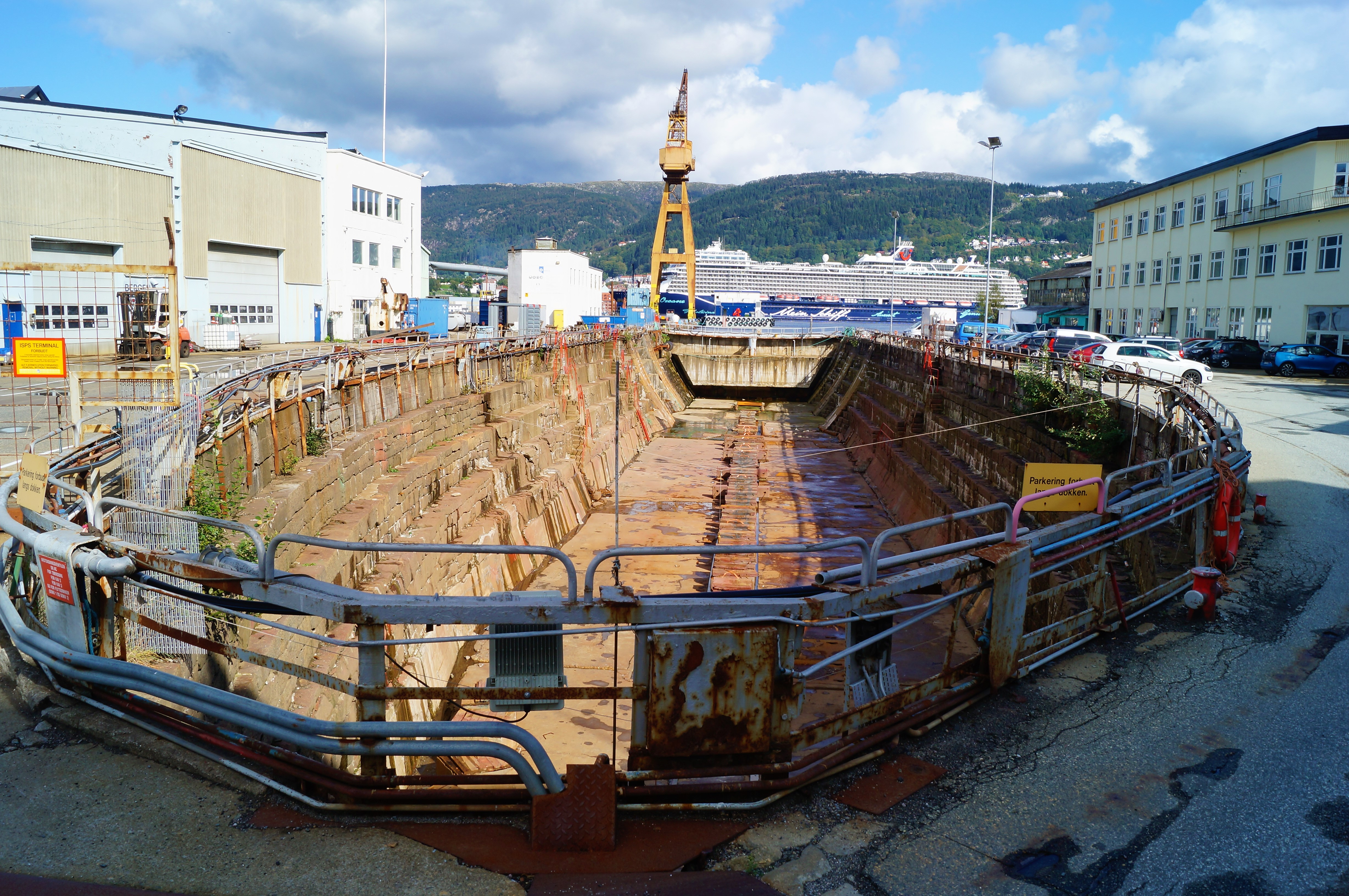 Tørrdokk på Laksevåg